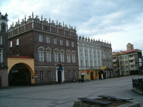 Sukiennice na rynku